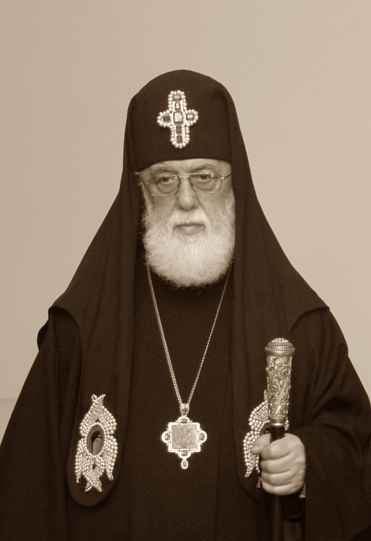 საქართველოს კათოლიკოს-პატრიარქი ილია II